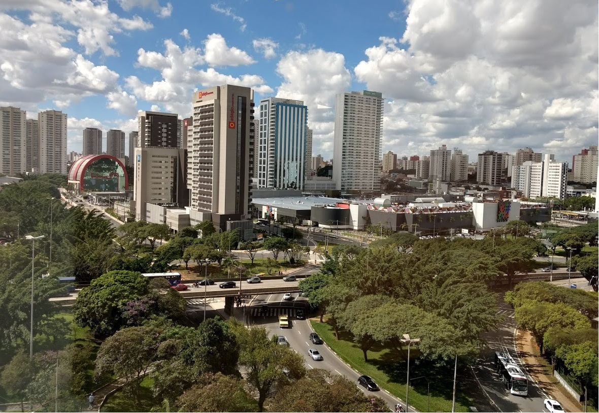 São Bernardo do Campo - Rua Vergueiro - Shopping Metrópole